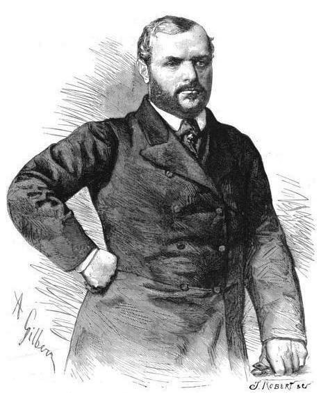 Le prince Henri de La Tour d'Auvergne